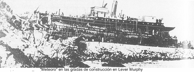 Escampavía “Meteoro” Esta nave, de 150 pies de eslora, fue diseñada para el servicio de los faros. Se puso su quilla en 1900 en los astilleros Lever, Murphy & Co. de Caleta Abarca en Viña del Mar y fue lanzado el 24 de noviembre de 1901.